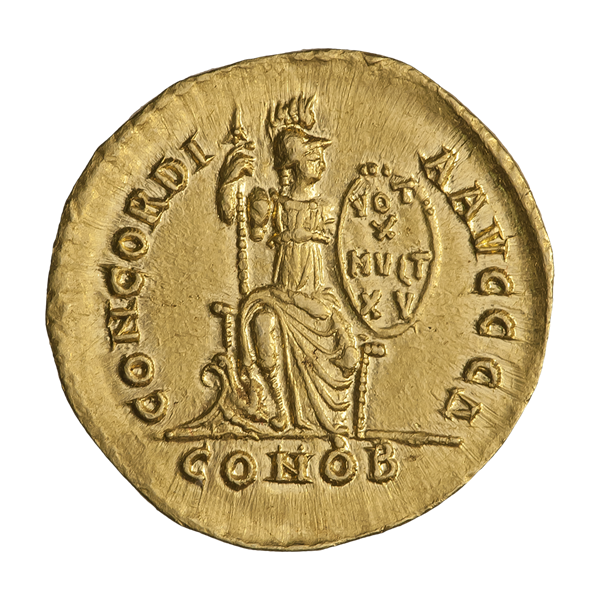 Феодосий I Великий (379—395). Солид. Ок. 383—388 гг. Константинополь. Оффицина Δ. Реверс. Константинополь в шлеме сидит на троне, прямо; голова повернута вправо; в правой руке держит копьё, в левой — щит с надписью в четыре строки VOT/X/MVLT/XV. В обрезе CONOB.